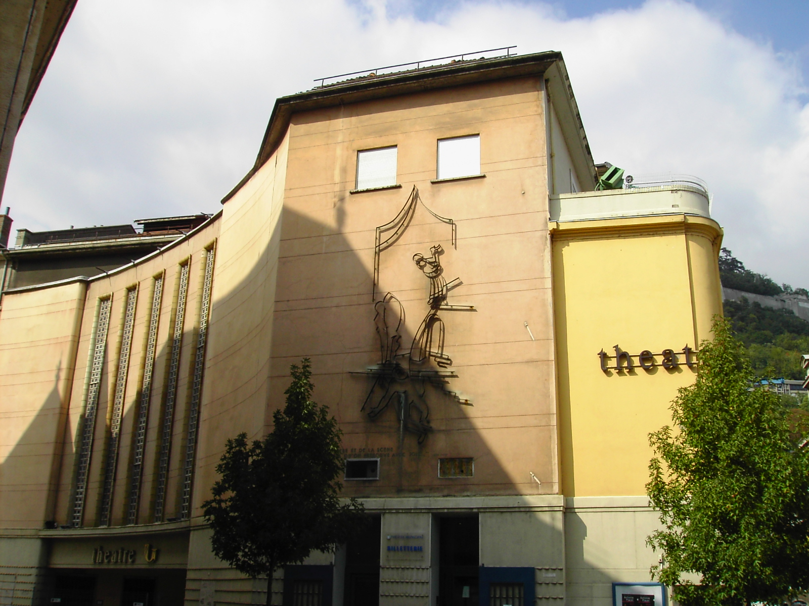 Théâtre Municipal de Grenoble, côté place Saint-André